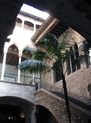 Museu Picasso al carrer Montcada